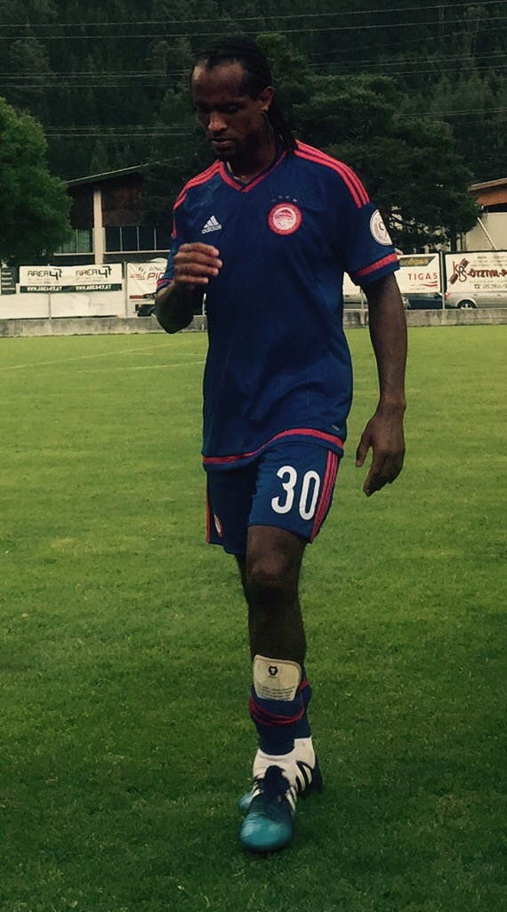 Leandro Salino do Carmo - friendly against Sivasspor in 2015